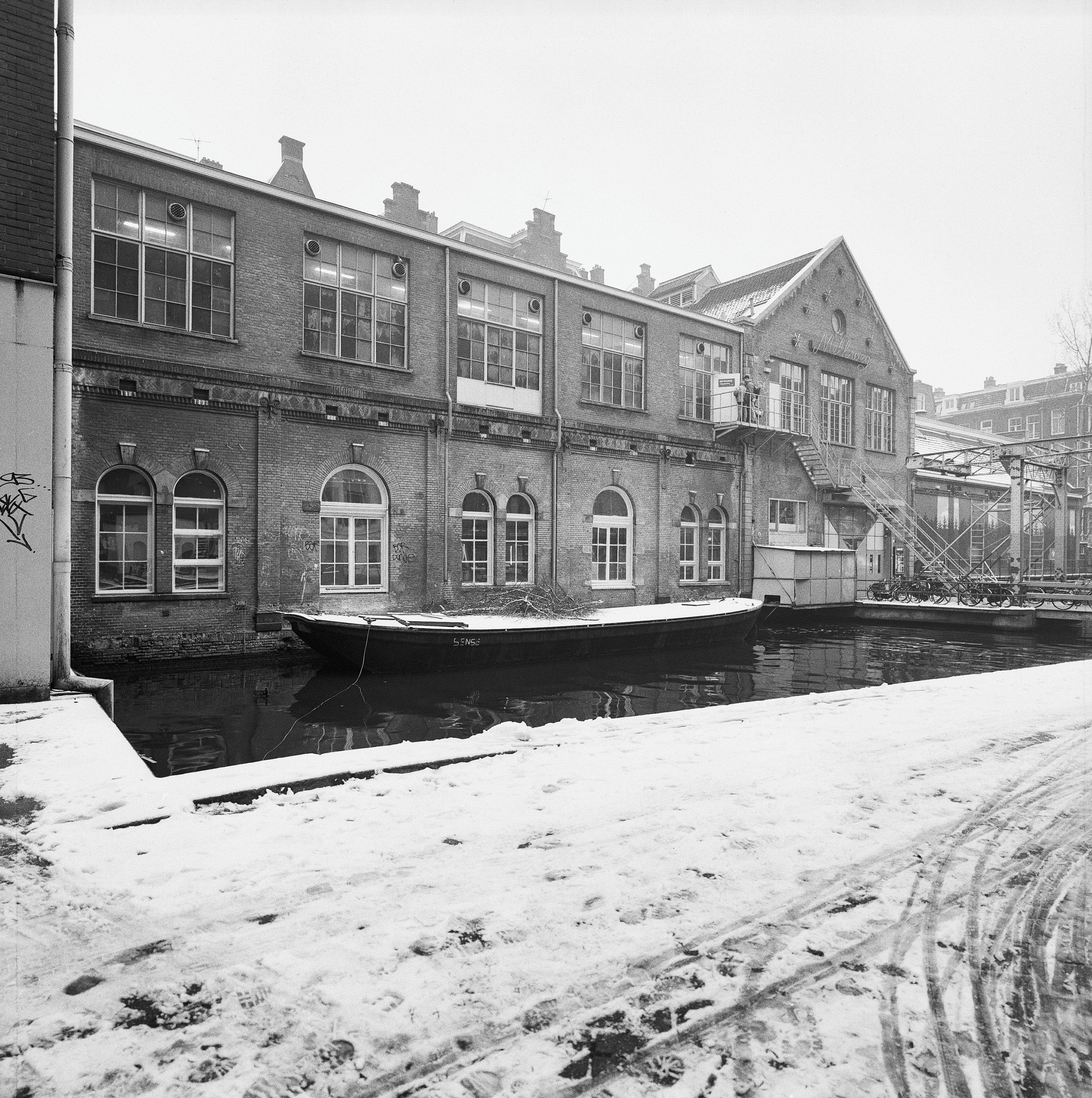 Overzicht voorzijde aan de Lijnbaansgracht; rechts de Melkfabriekbrug